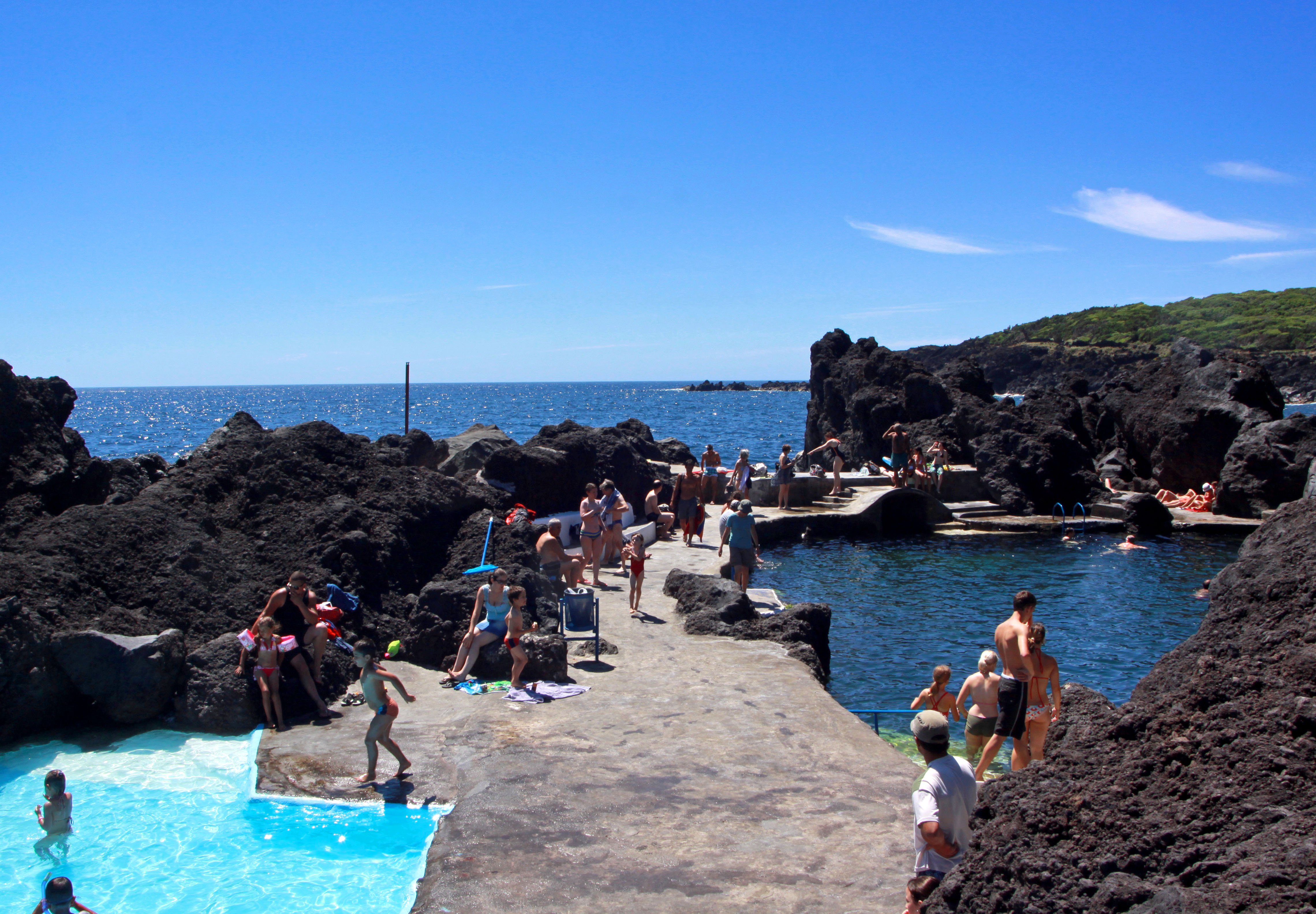 Ilha do Faial, Açores. A la piscine naturelle de Varadouro.